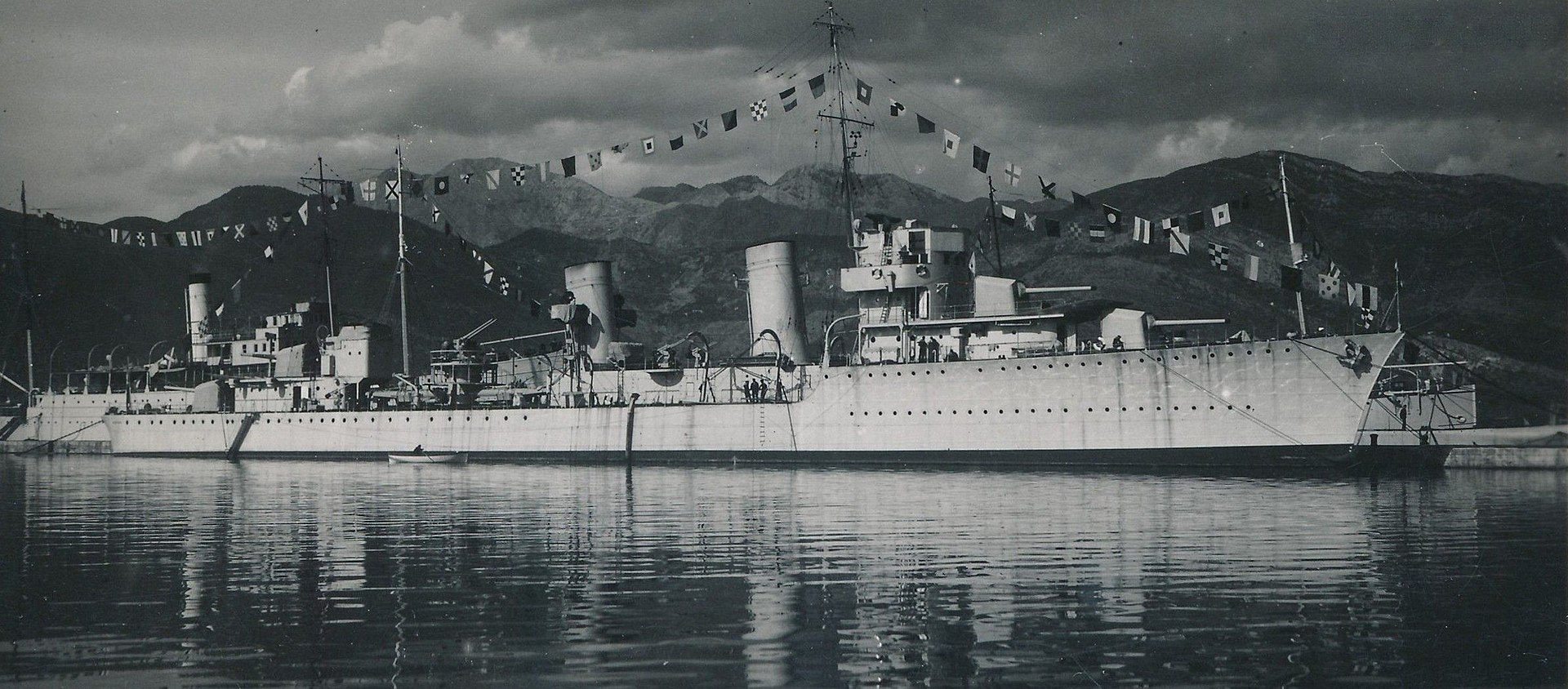 Југословенски велики разарач Дубровник у Боки Которској. Description Yugoslavian large destroyer Dubrovnik in Bay of KotorDate 1933Source Russian magazine Морская Кампания 2017 №1 (65) Югославские эсминцы второй мировойAuthor Unknown/Royal Yugoslav Navy Yugoslavian large destroyer Dubrovnik in Bay of Kotor